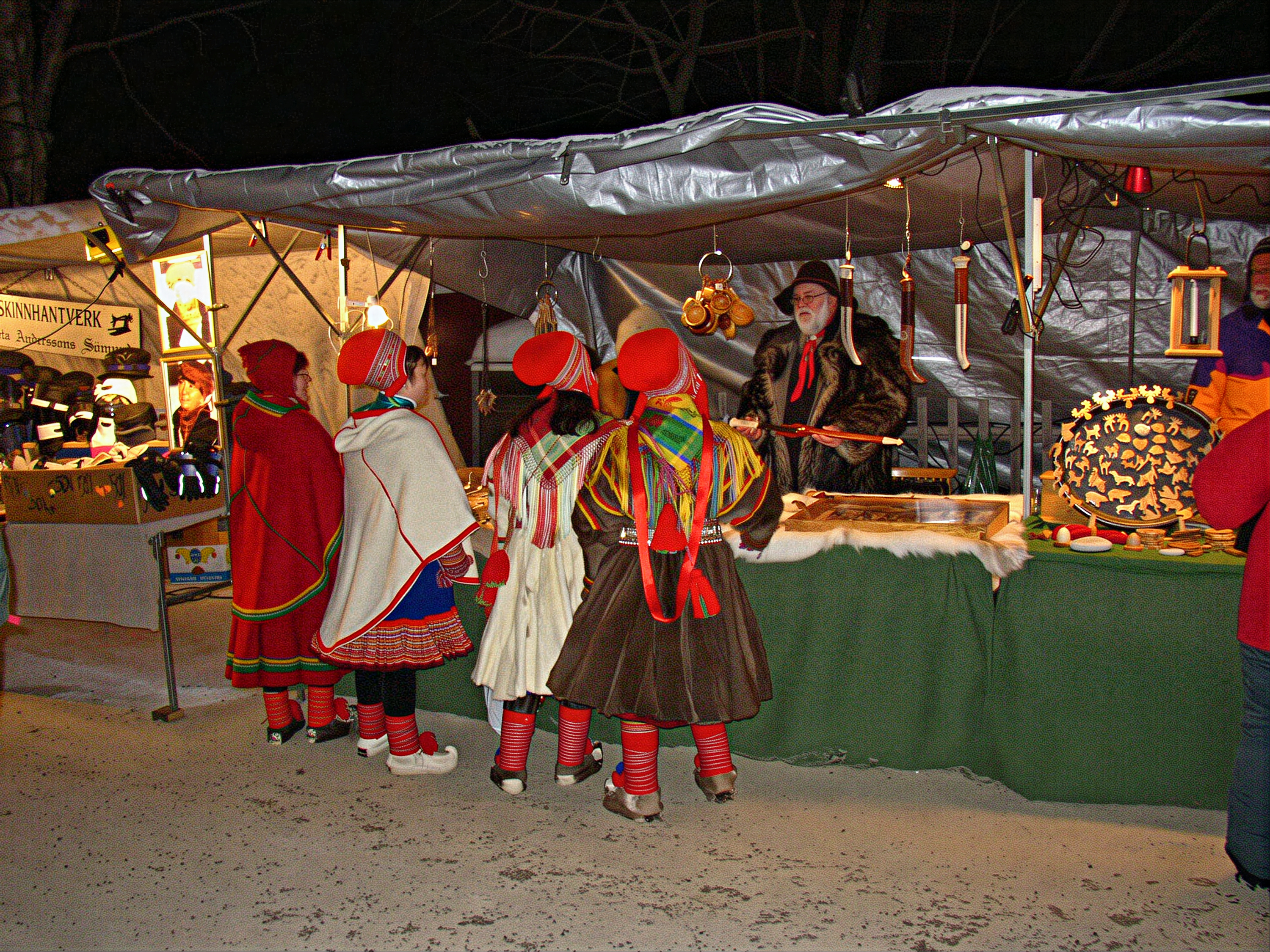 Marktstand auf Jokkmokks Wintermarkt